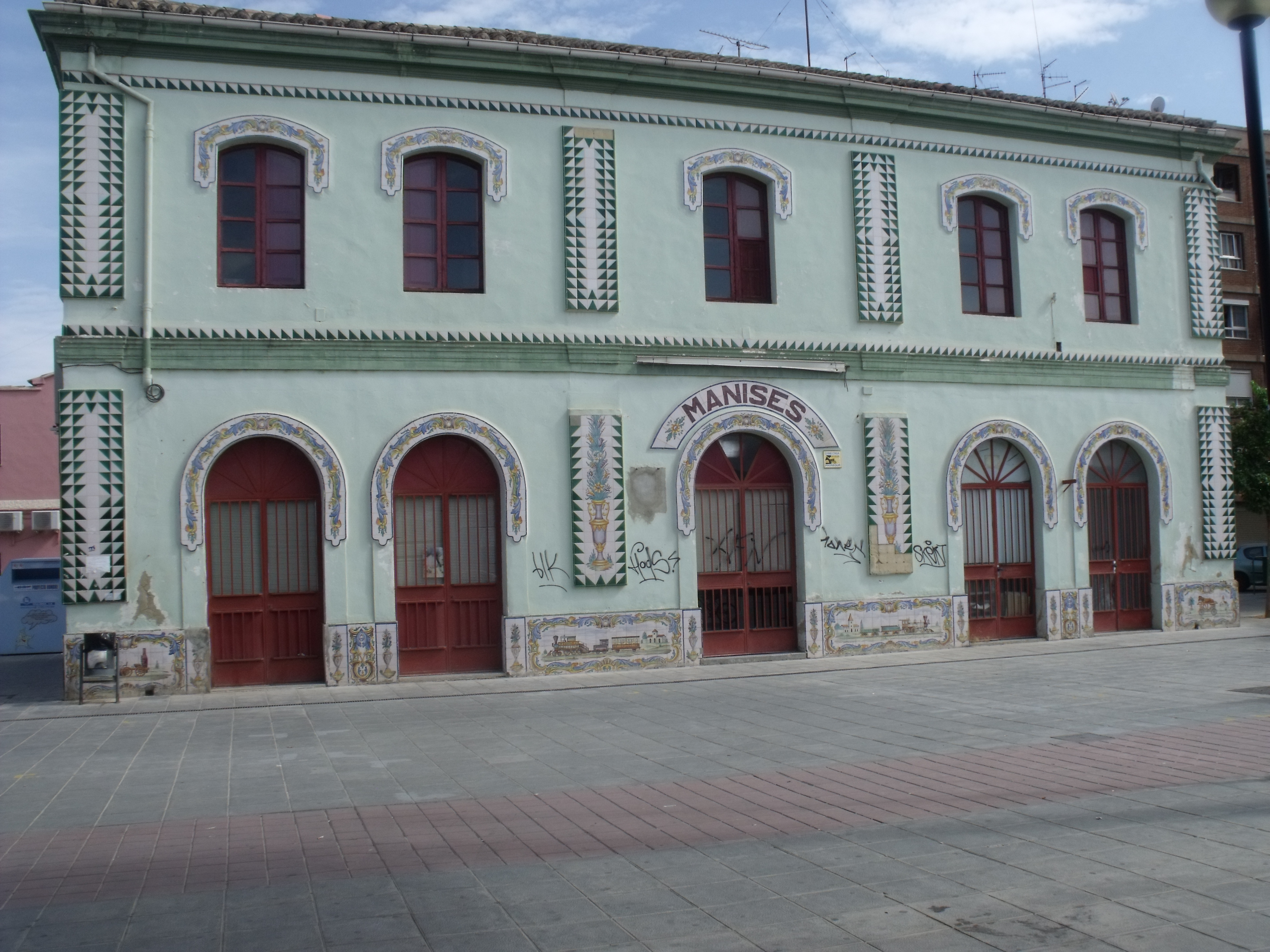 Edificio de la antigua estación, fachada principal